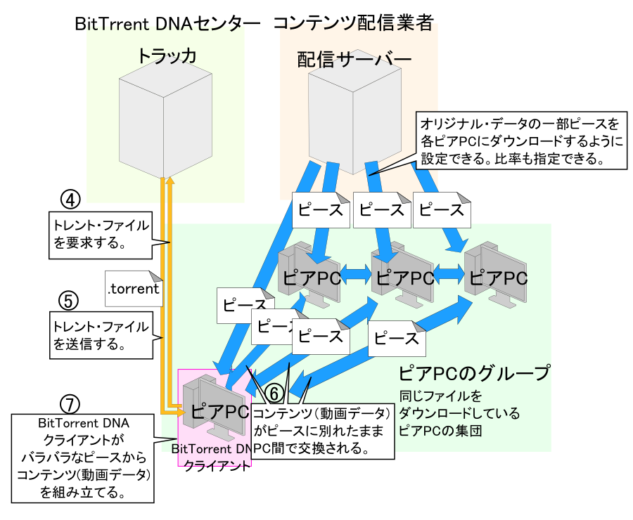 BitTorrent DNAの動作説明